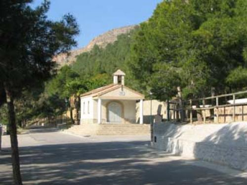 Paraje de la Ermita dela Salud